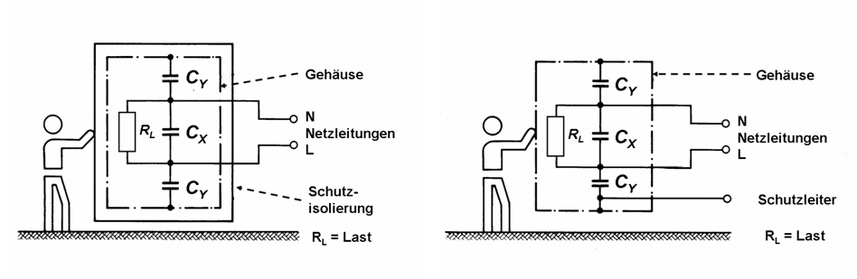 Anschlussweise von Entstörkondensatoren